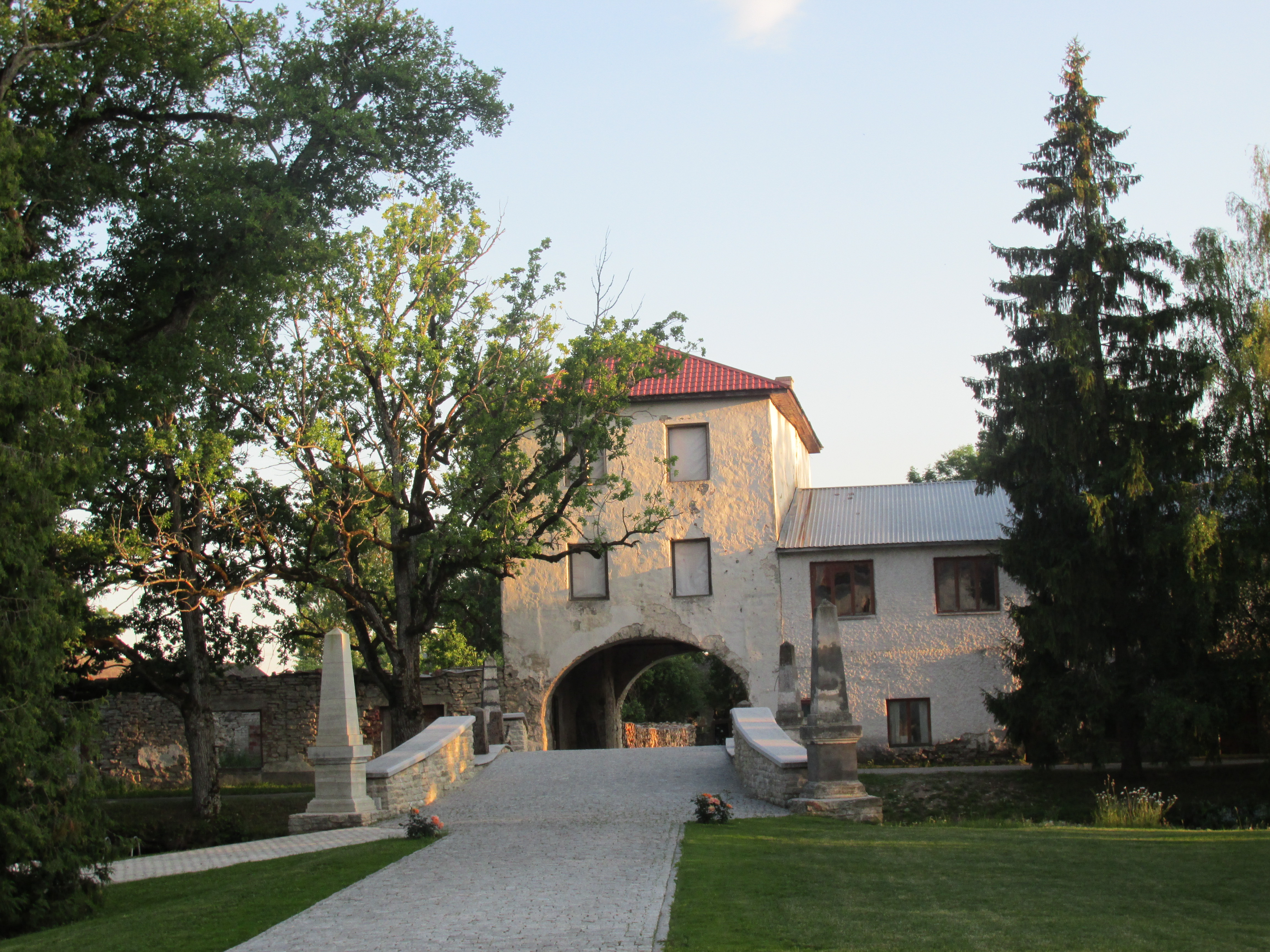 Koluvere mõisa väravatorn pärast renoveerimist